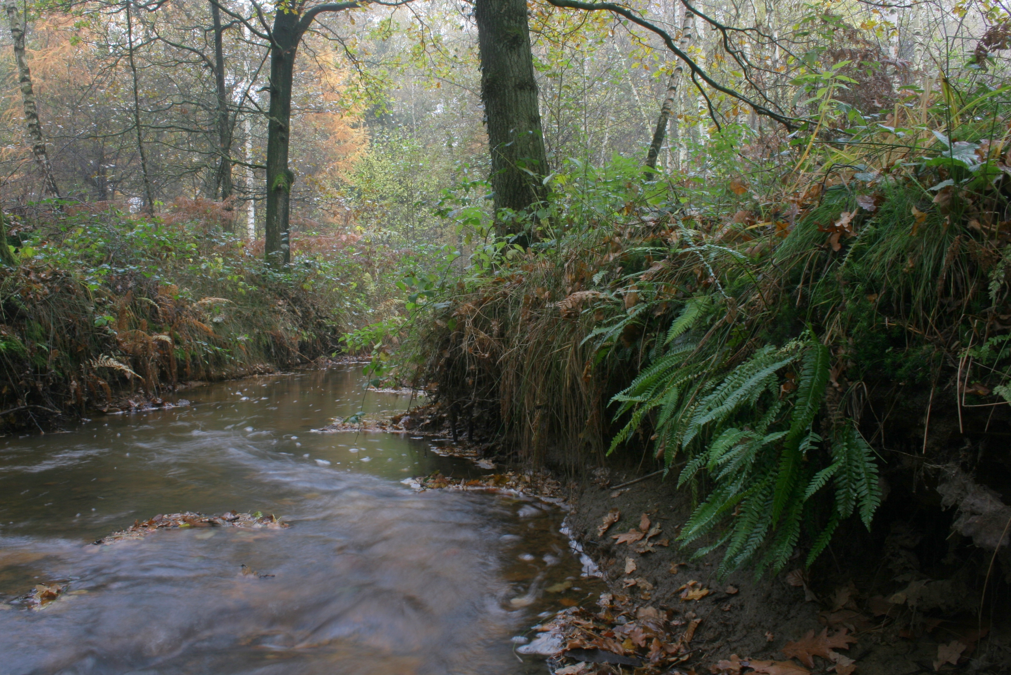 terrein natuurmonumenten